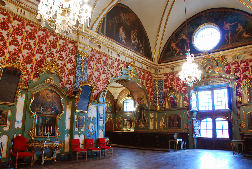 Sacristía decorada en estilo rococó de la catedral de Pamplona